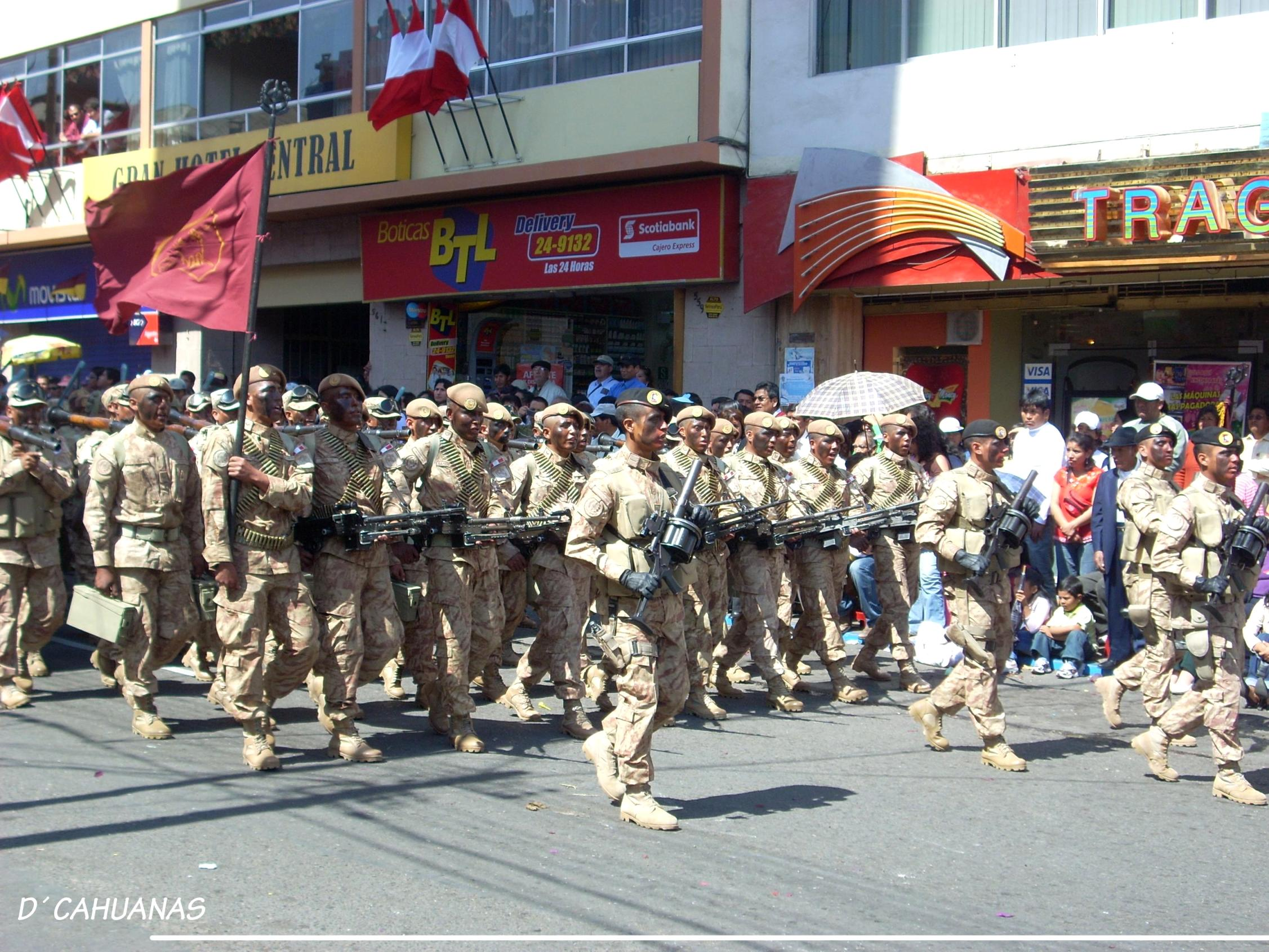 military of tacna